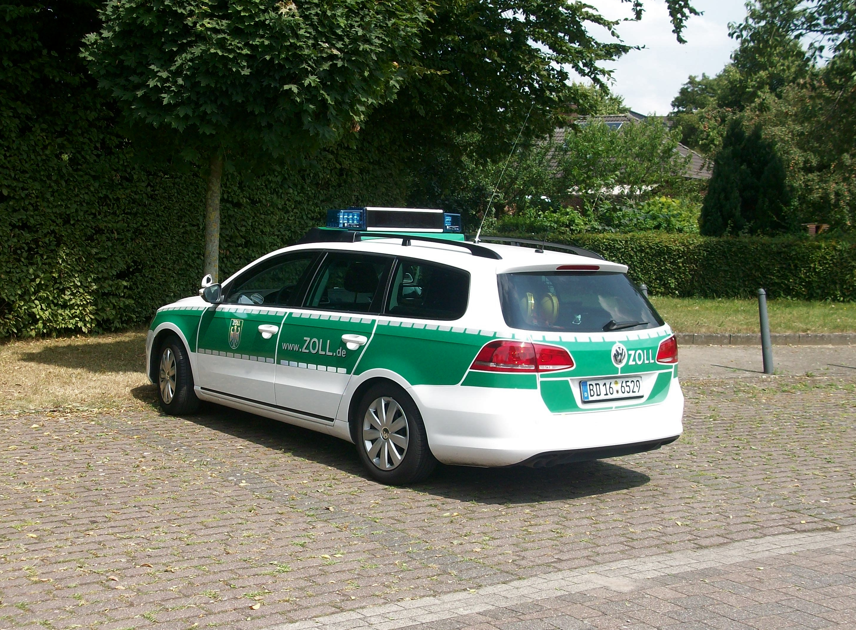 Véhicule de la douane allemande, W.O.A. 2014